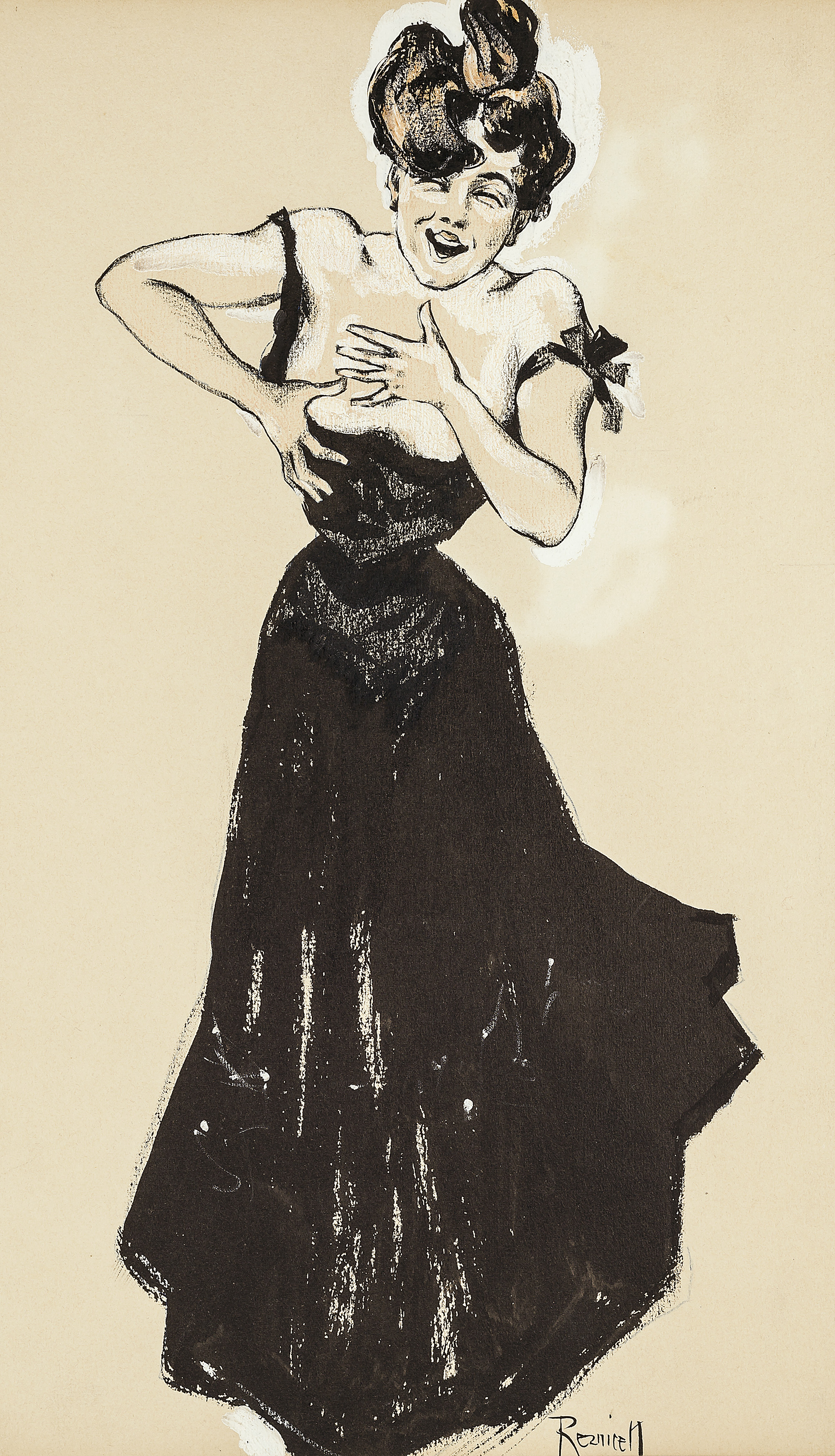 Ferdinand von Rezniček: Am Busen der Natur. Tusche, Farbstift und Deckweiß auf Karton, 40 x 23,5 cm, rechts unten signiert